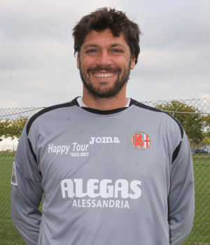 Fabio Artico (Venaria Reale, 9 dicembre 1973), un calciatore italiano, attaccante dell'Alessandria.